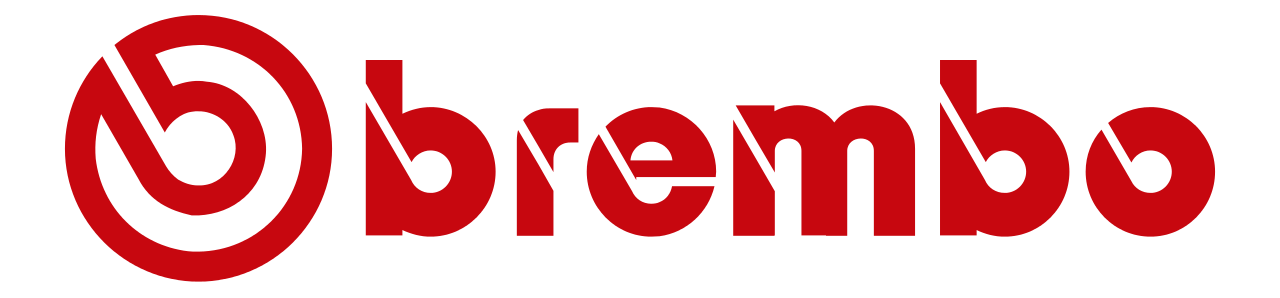 Логотип компании Brembo